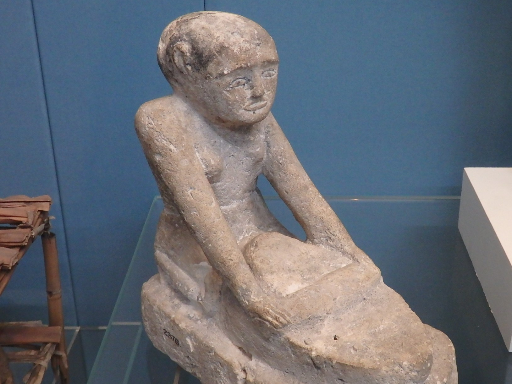 mahlender Sklave oder Diener, Altägypten, ca. 2345 - 2181 v. Chr., British Museum EA 2378